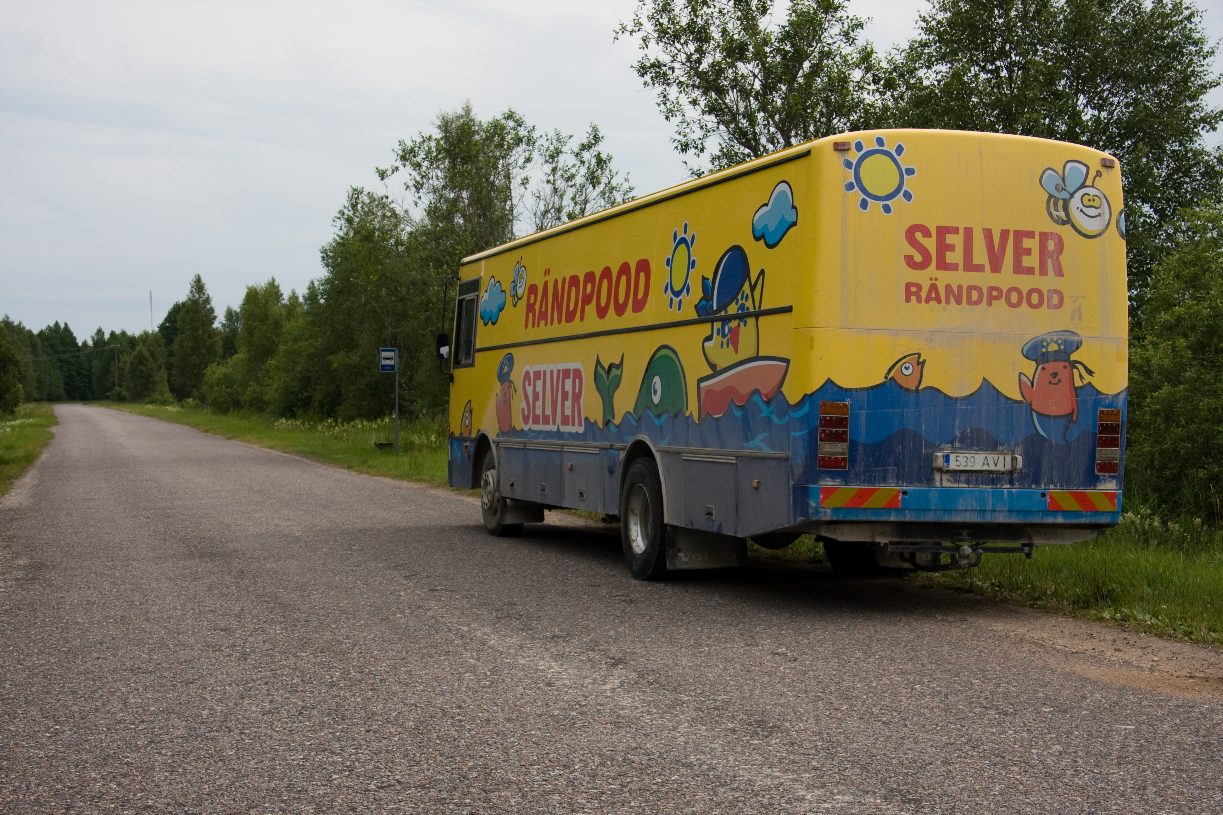 Selveri rändpood Hiiumaal Käina vallas Ühtri küla bussipeatuse juures